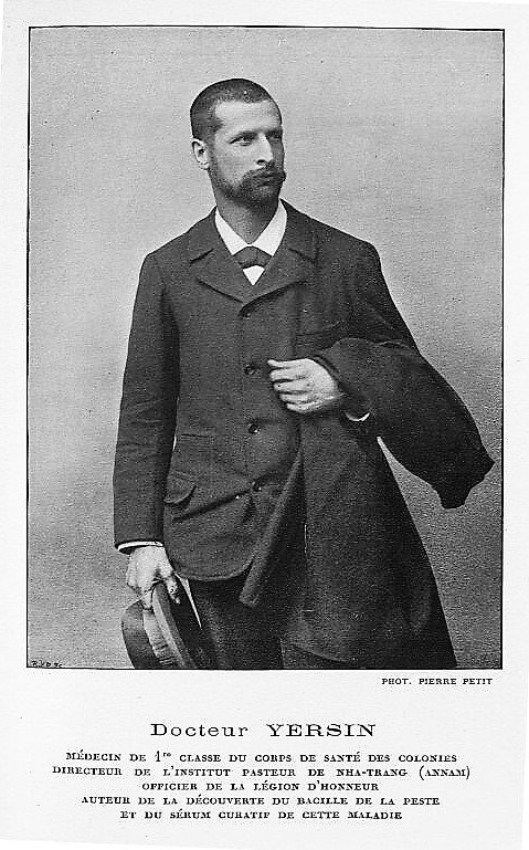 Docteur Yersin - La peste en Normandie du XIVe au XVIIe siècle Auteur de l'ouvrage : PORQUET, Louis Ouvrage : La peste en Normandie du XIVe au XVIIe siècle Edition : Paris : Alexandre Coccoz, 1898